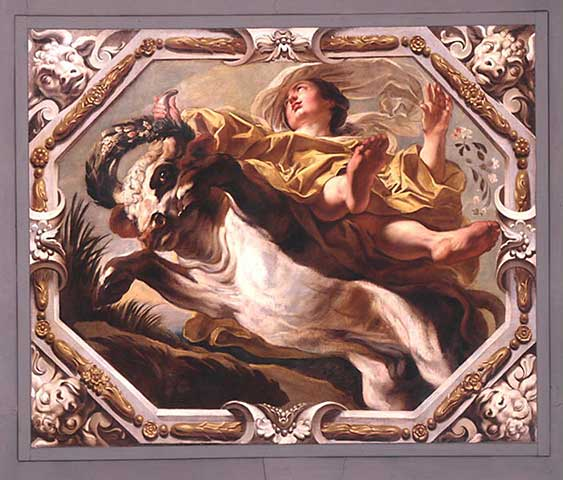 Les Signes du Zodiaque, Taureau